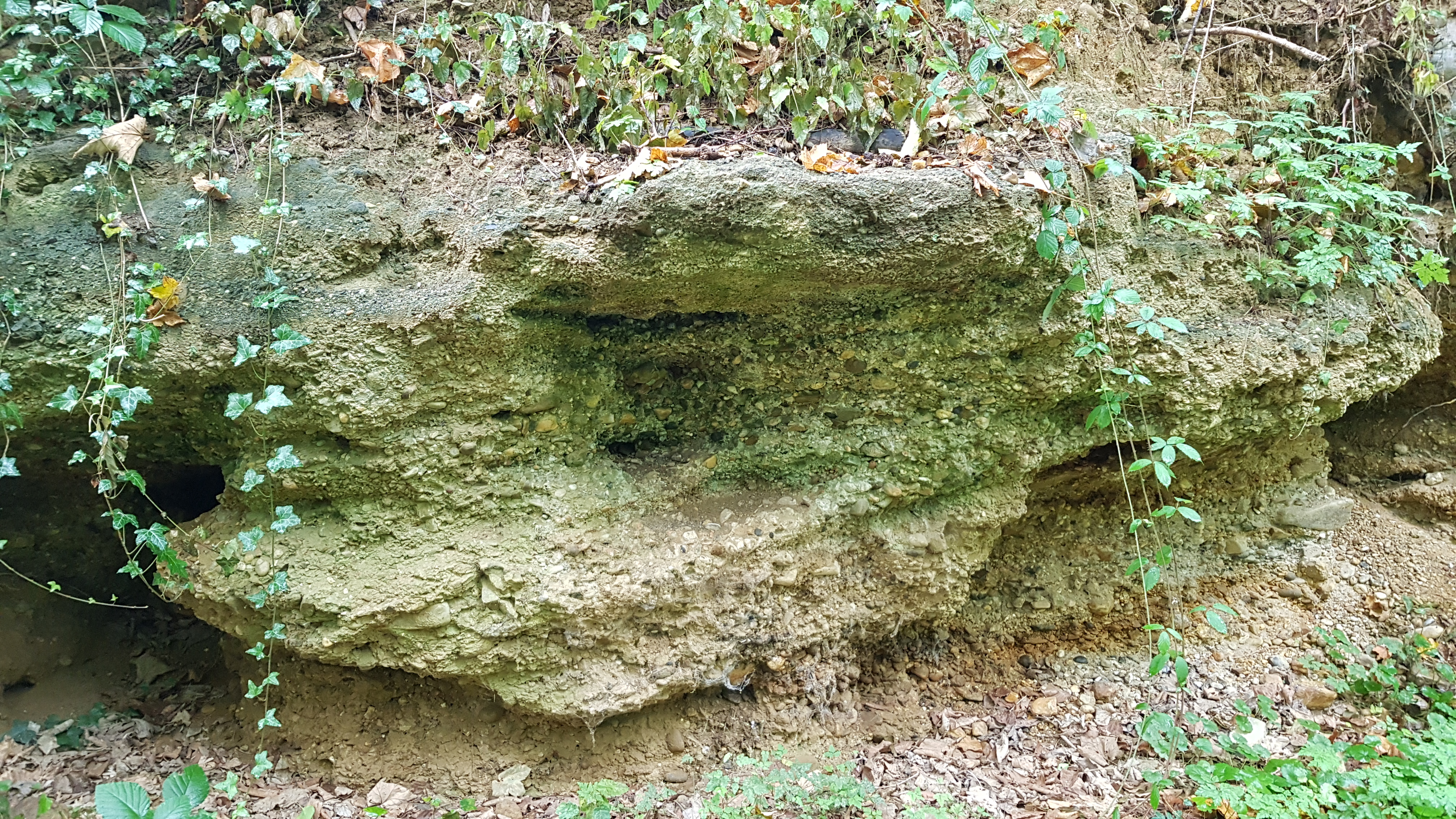 Geologisch monument Diependaal, Spaubeek, Nederland